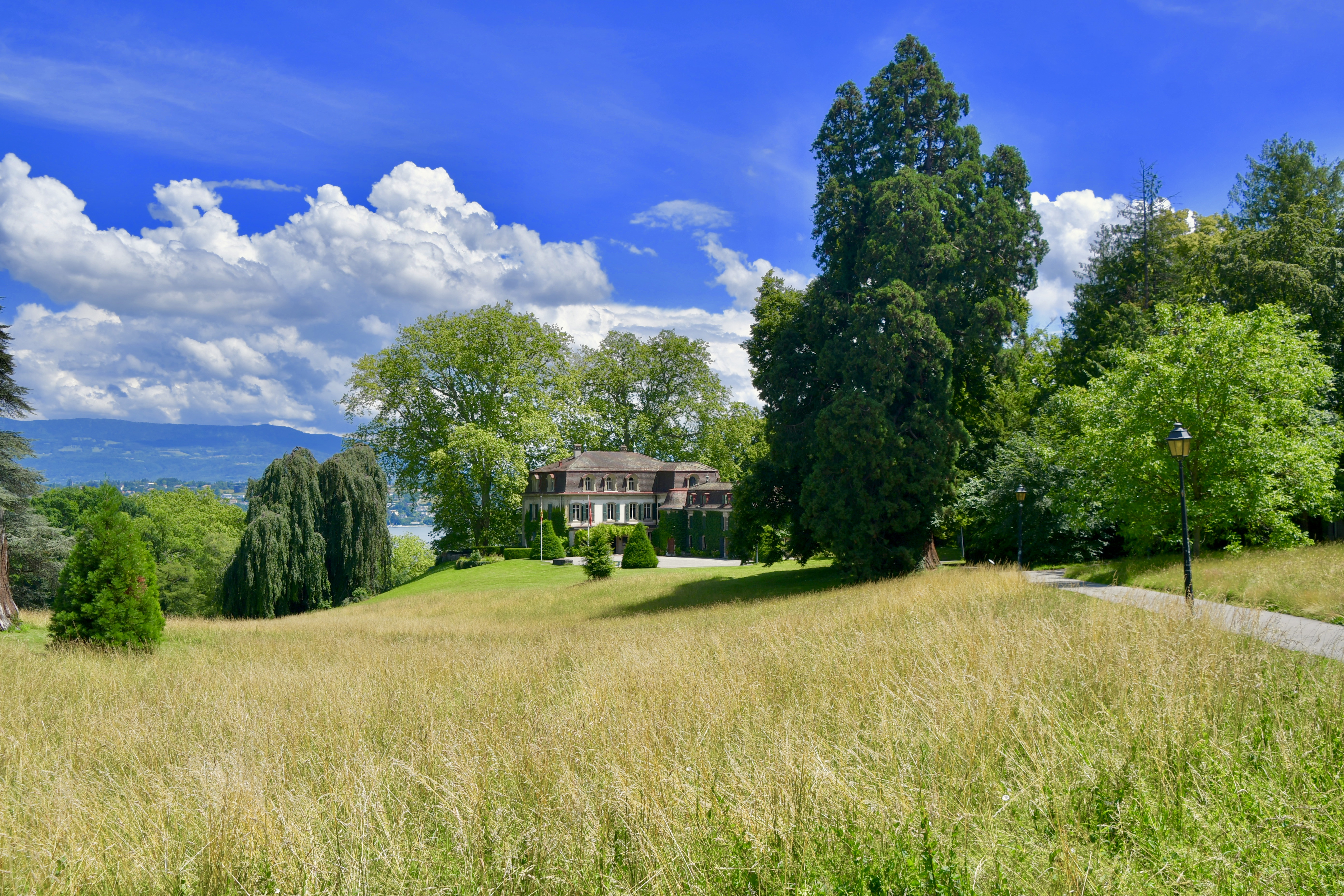 Le château de Penthes à Pregny-Chambésy (GE), en Suisse.